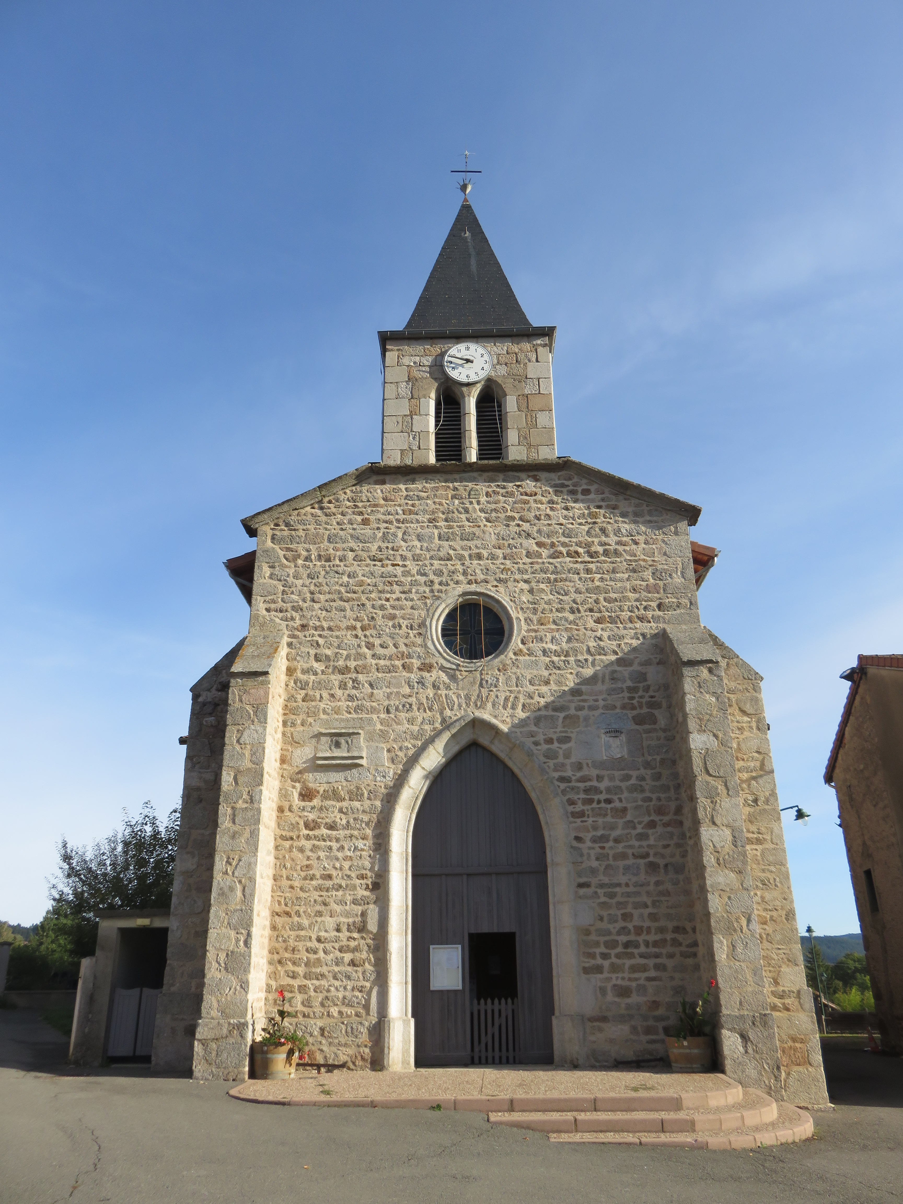 Vue de l'église Saint-Georges de Chausseterre (Loire, France).